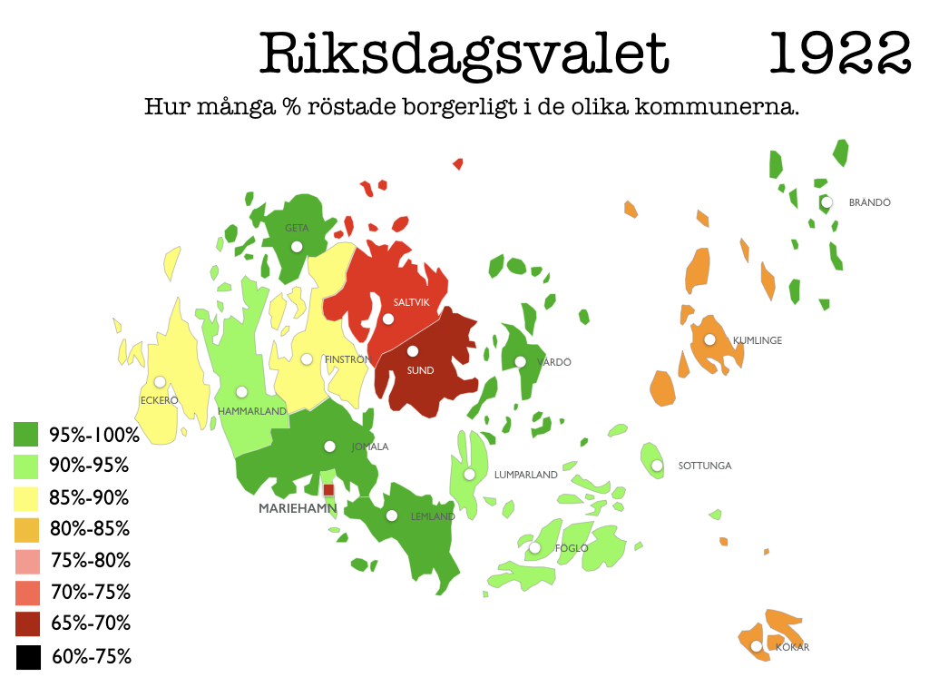 Kartan visar hur borgerligt ålänningarna röstade i riksdagsvalet 1922 och detta per kommun.